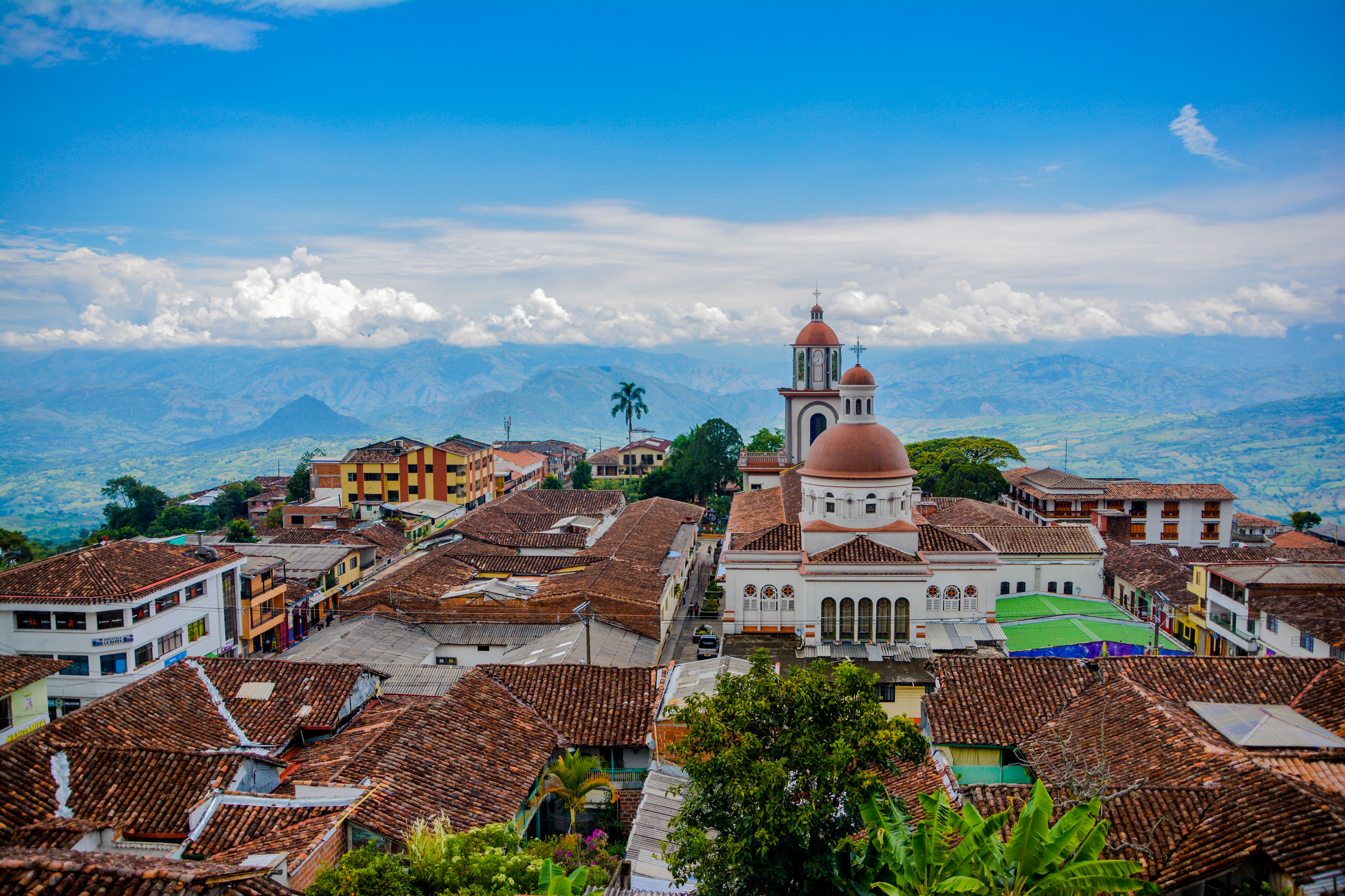 Támesis es un municipio ubicado en el Departamento de Antioquia, Colombia. Esta a 111 Km de Medellín.